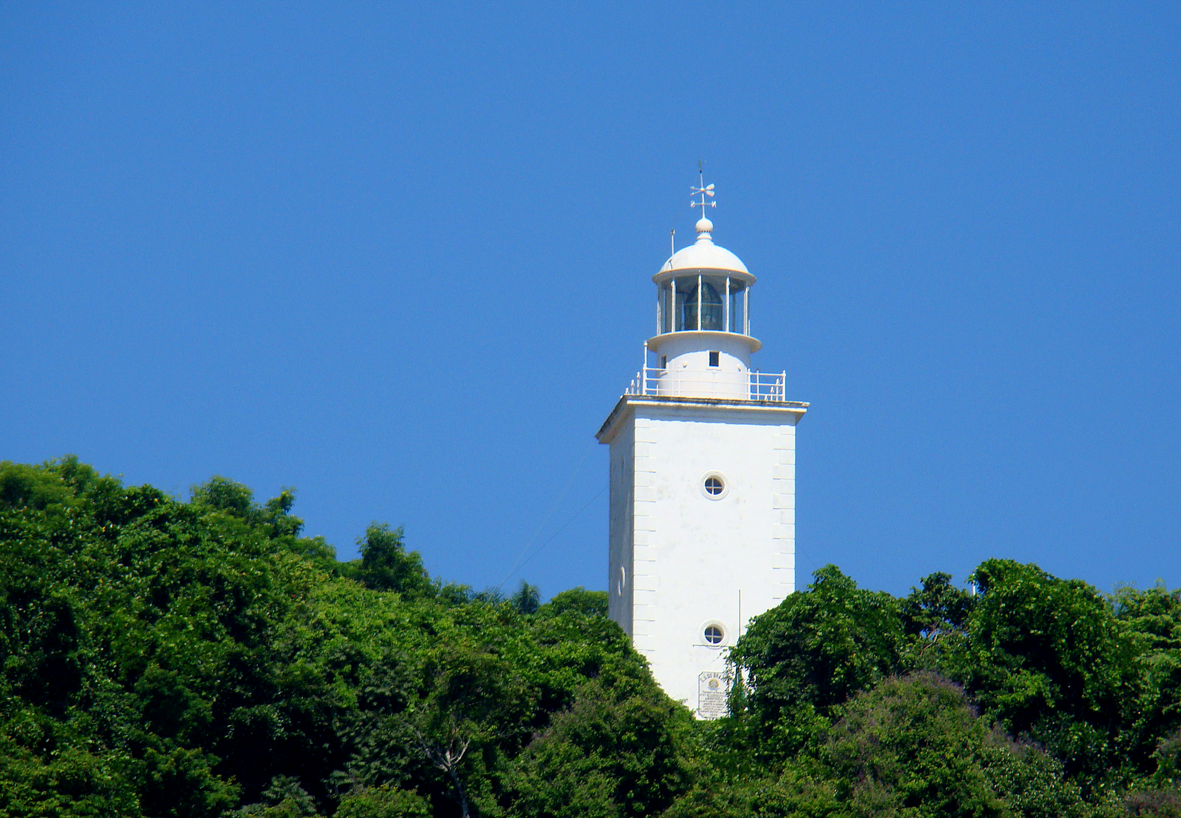 Ilha Grande. Rio de Janeiro, Brasil.